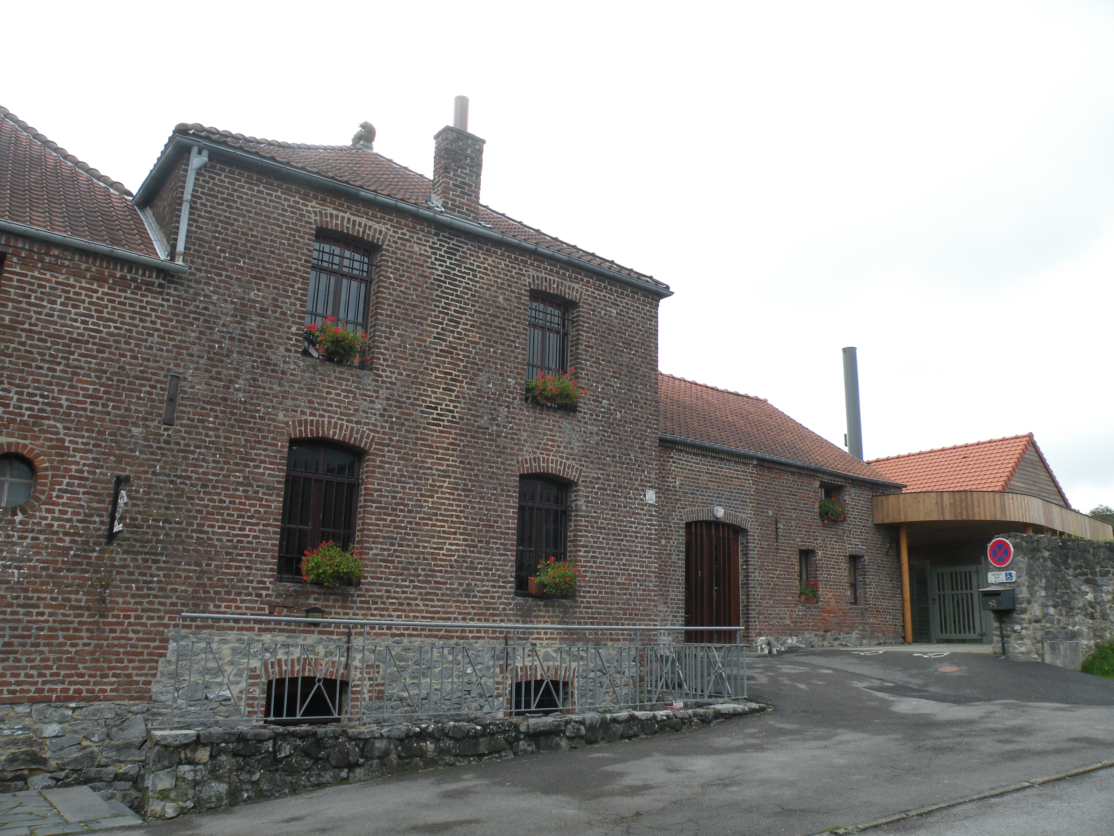 Musée de la Faïence et de la Poterie de Ferrière-la-Petite